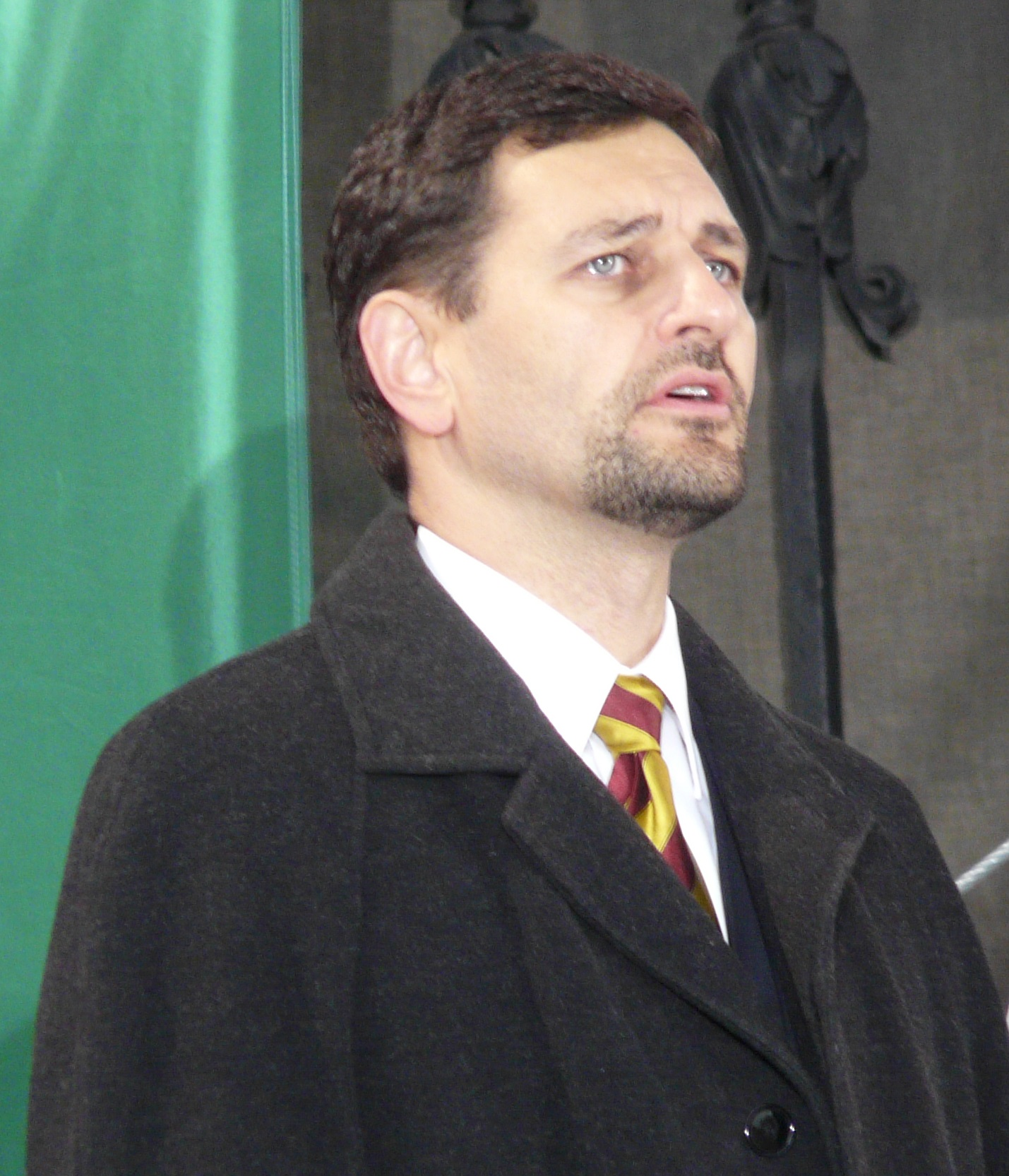 A felvétel 2008 október 23 -án, csütörtökön készült. A FIDESZ Magyar Polgári Párt Budapesten, a Várnegyedben, a Dísz téren tartotta megemlékezését. Dr.Nagy Gábor Tamás, Pokorny Zoltán. A felvétel megjelent Creative Commons alatt a Metapolisz DVD sorozatban.